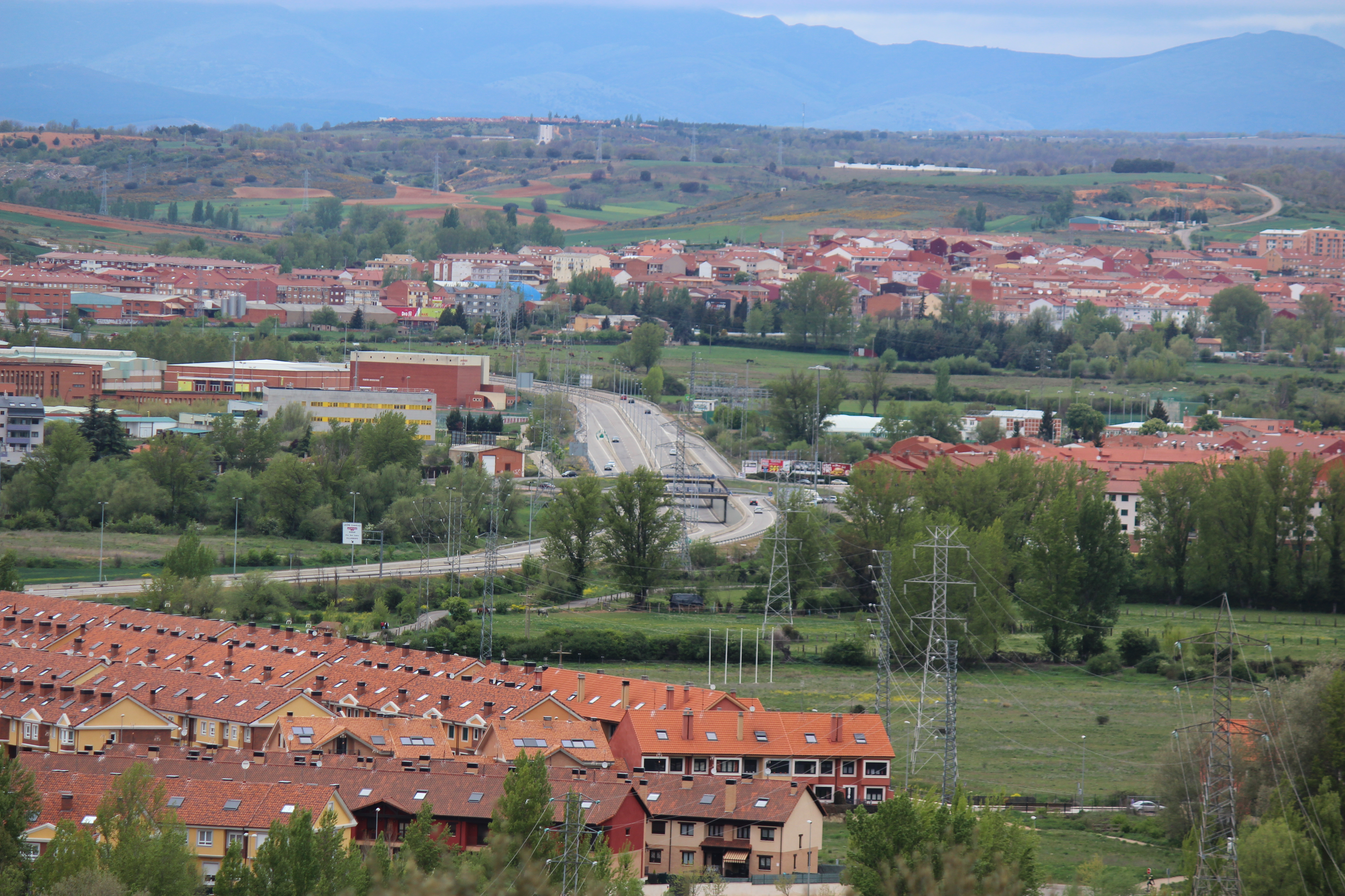 Vista de la ronda este de León desde el parque semiurbano de la Candamia.